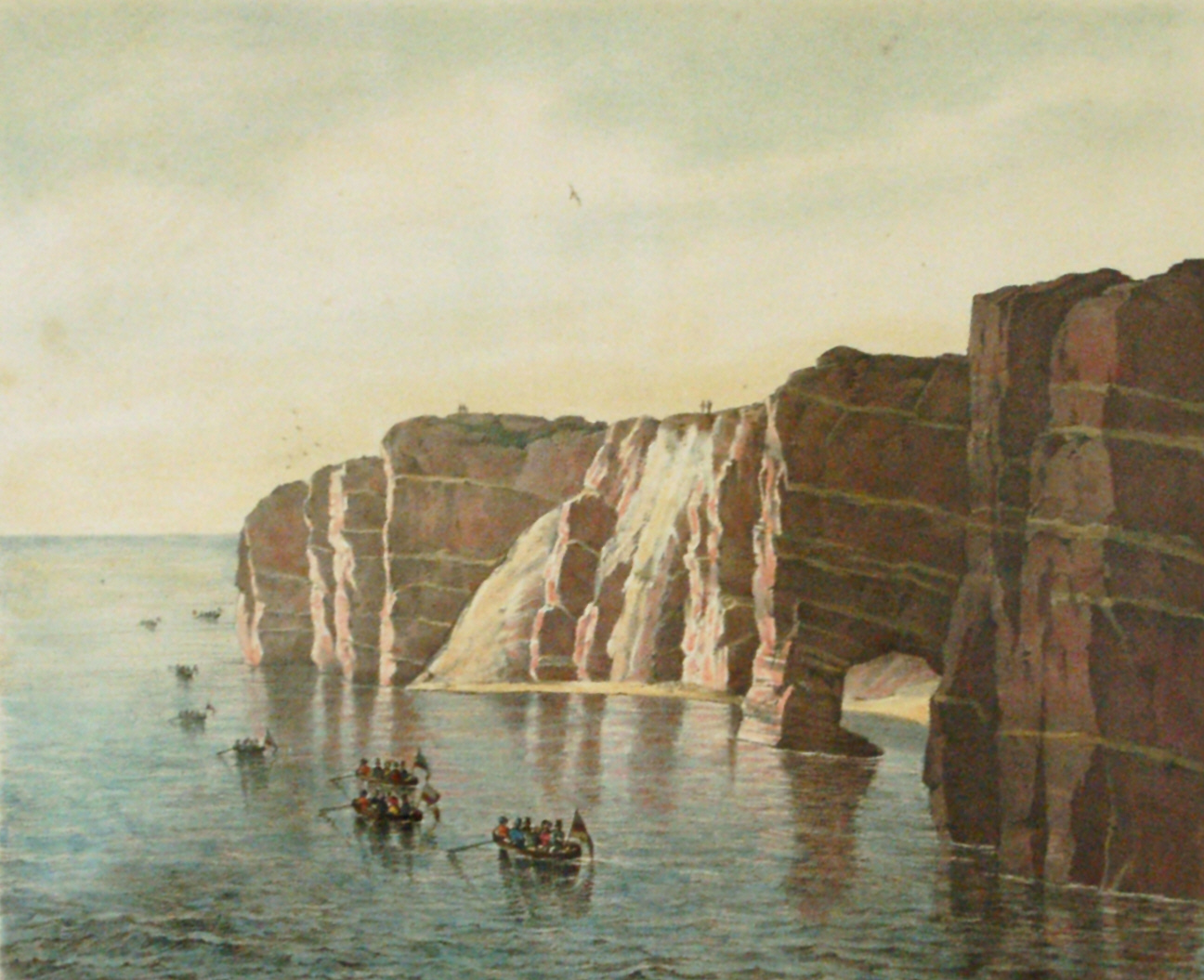 Westküste von Helgoland von Hermann Mevius (1820-1864)